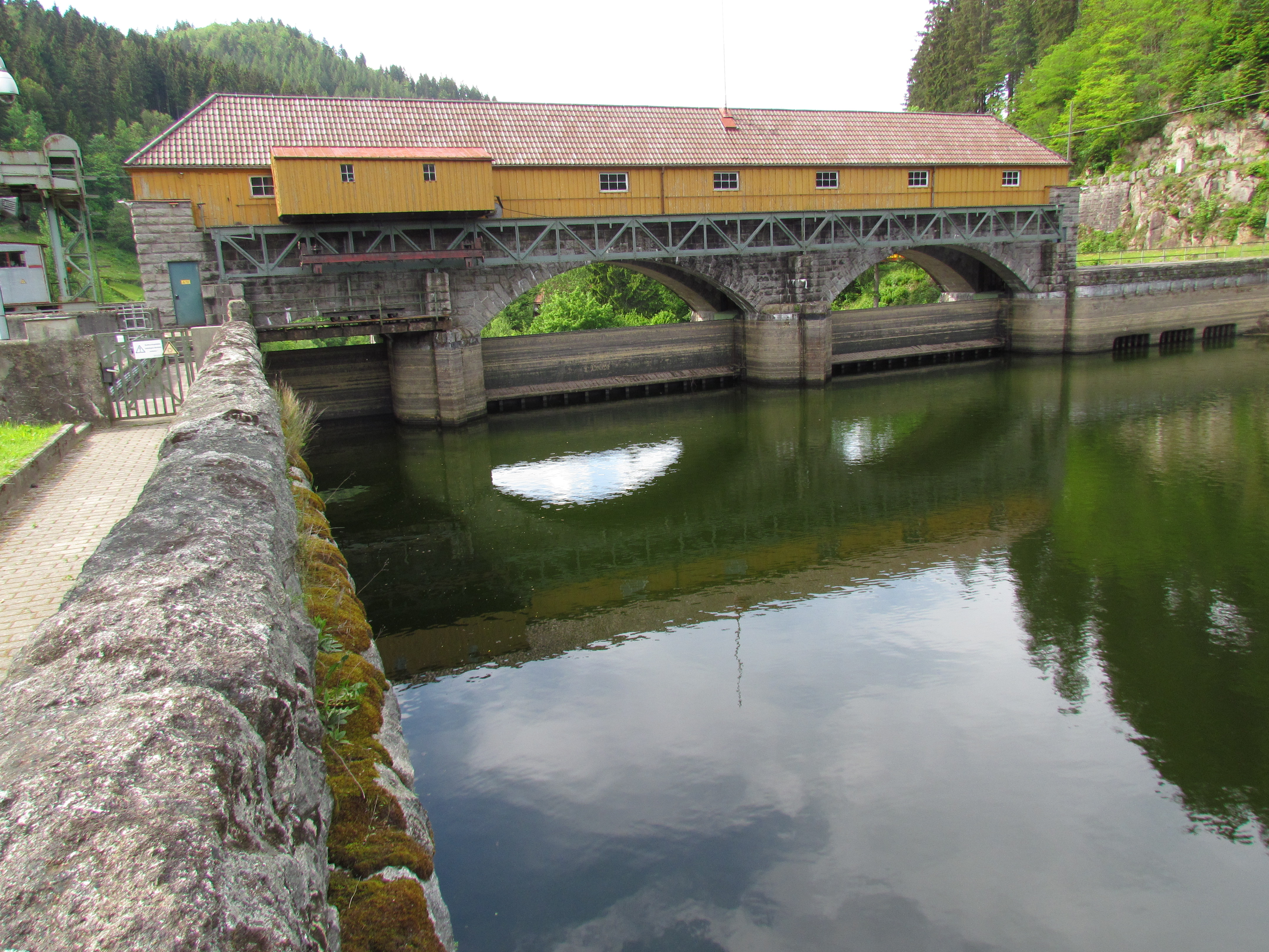 Bildinhalt: Murgtalsperre in Kirschbaumwasen: Staumauer mit Gebäude Aufnahmeort: Forbach (Baden), Deutschland